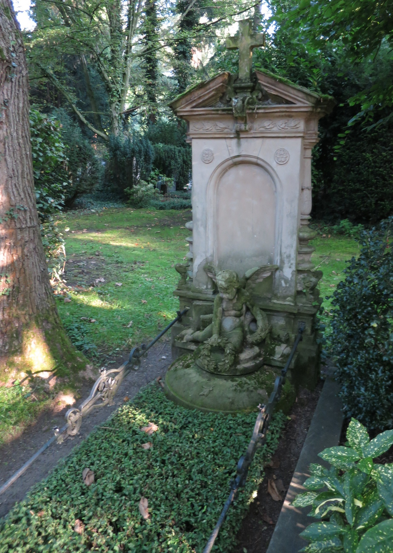 Wilhelm Pütz - Patenschaftsgrab auf Kölner Friedhof Melaten (Vorderseite)